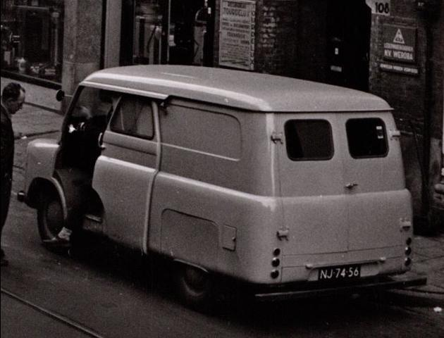 NJ-74-56 Bedford CA